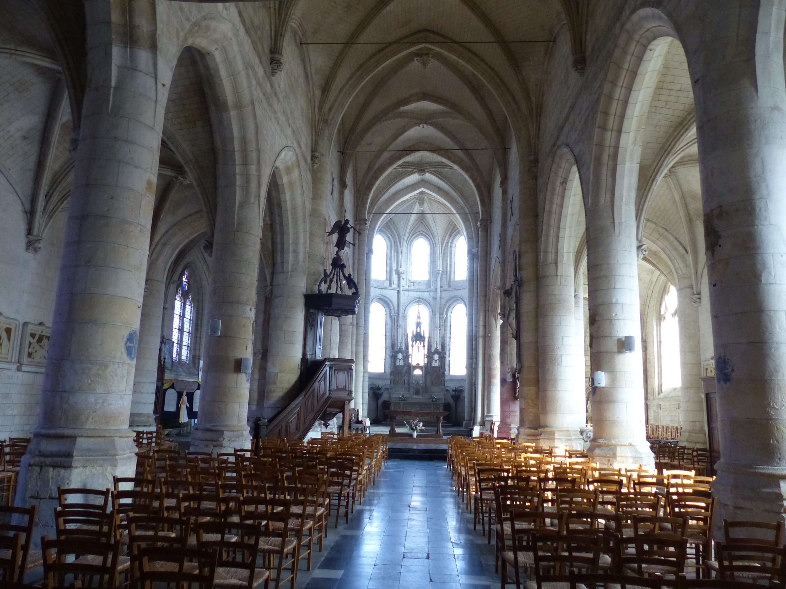 Intérieur de l'église Saint-Nicolas de Bray-sur-Somme